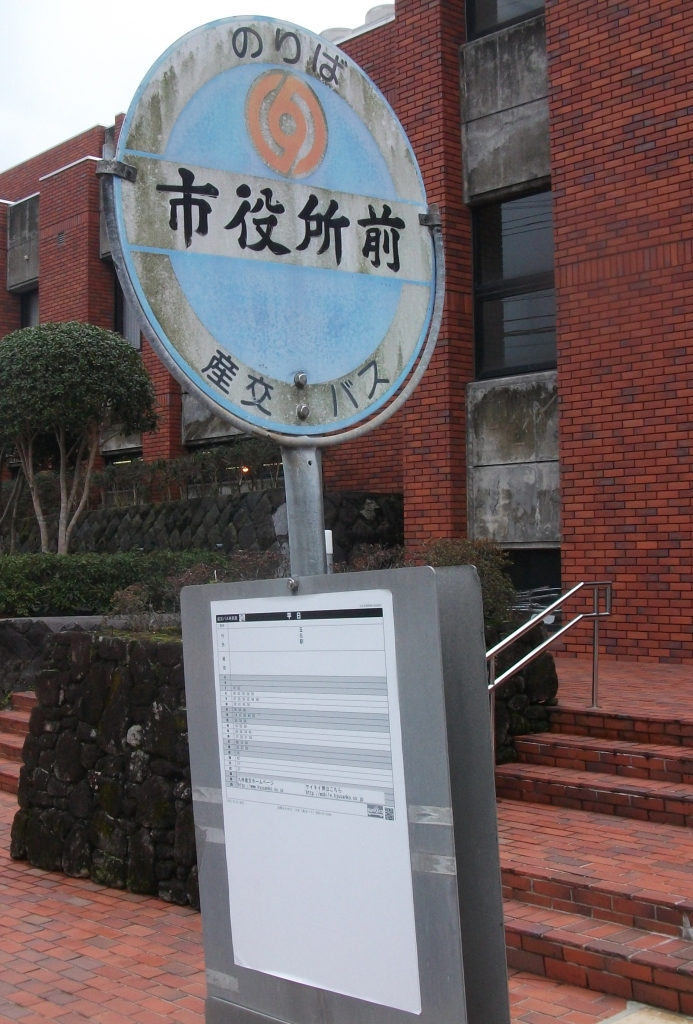 九州産交バス 市役所前（玉名市）